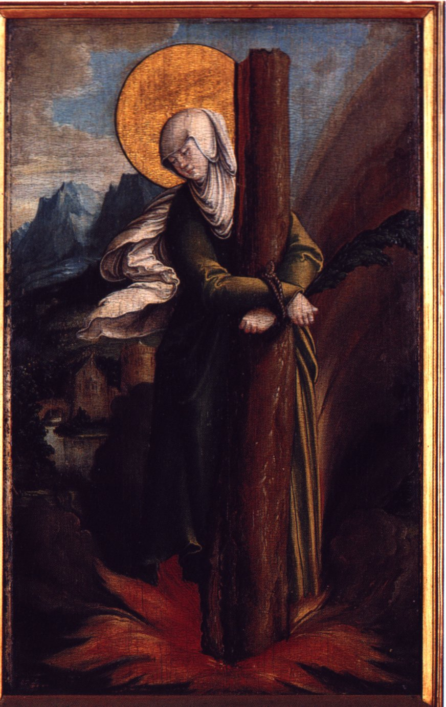 Ausstattung der ehemaligen Seitenaltäre der Meßkircher St. Martinskirche, Standflügel: Heilige Afra von Augsburg, Standflügel, Gegenpart zu Heiliger Paul Eremit Eingescannt aus: Anna Moraht-Fromm und Hans Westhoff: Der Meister von Meßkirch – Forschungen zur südwestdeutschen Malerei des 16. Jahrhunderts, Ulm, 1997, S. 161 rechts